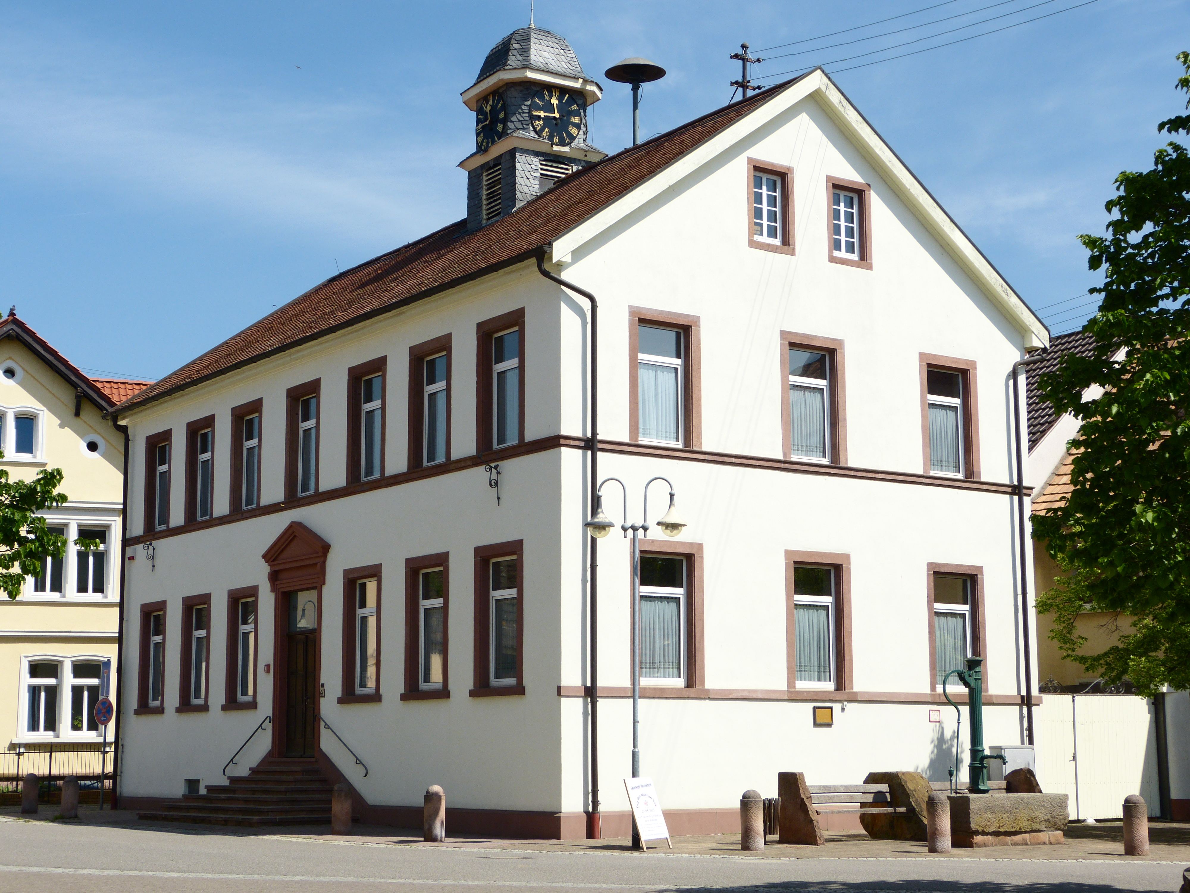 Heuchelheim Hauptstraße 9: ehemaliges Rathaus und zweites Schulhaus, sandsteingegliederter Putzbau, 1821, Aufstockung 1855, Uhrturm; denkmalgeschützt, ortsbildprägend